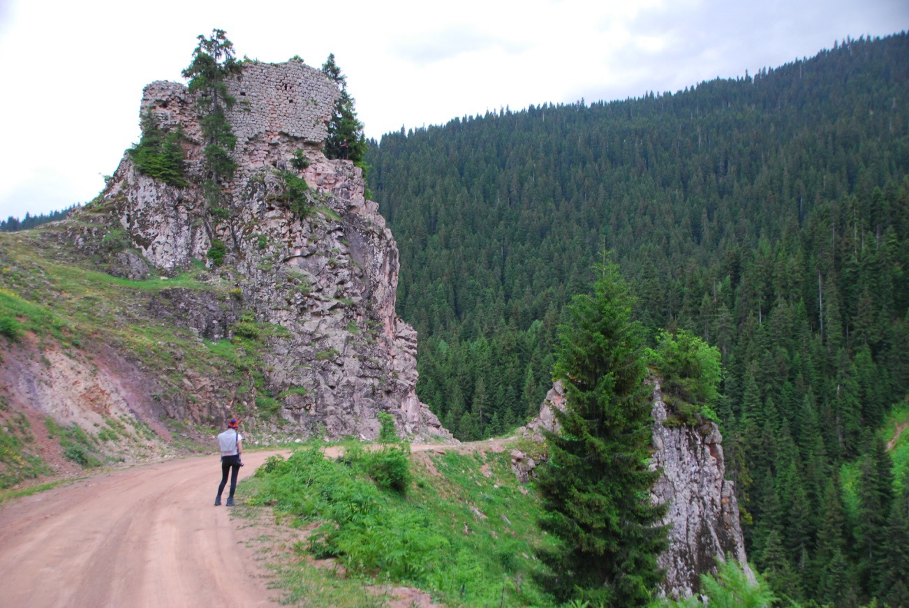 Maden köyü yolu üzerinde bulunan Çağlıyan Kalesi